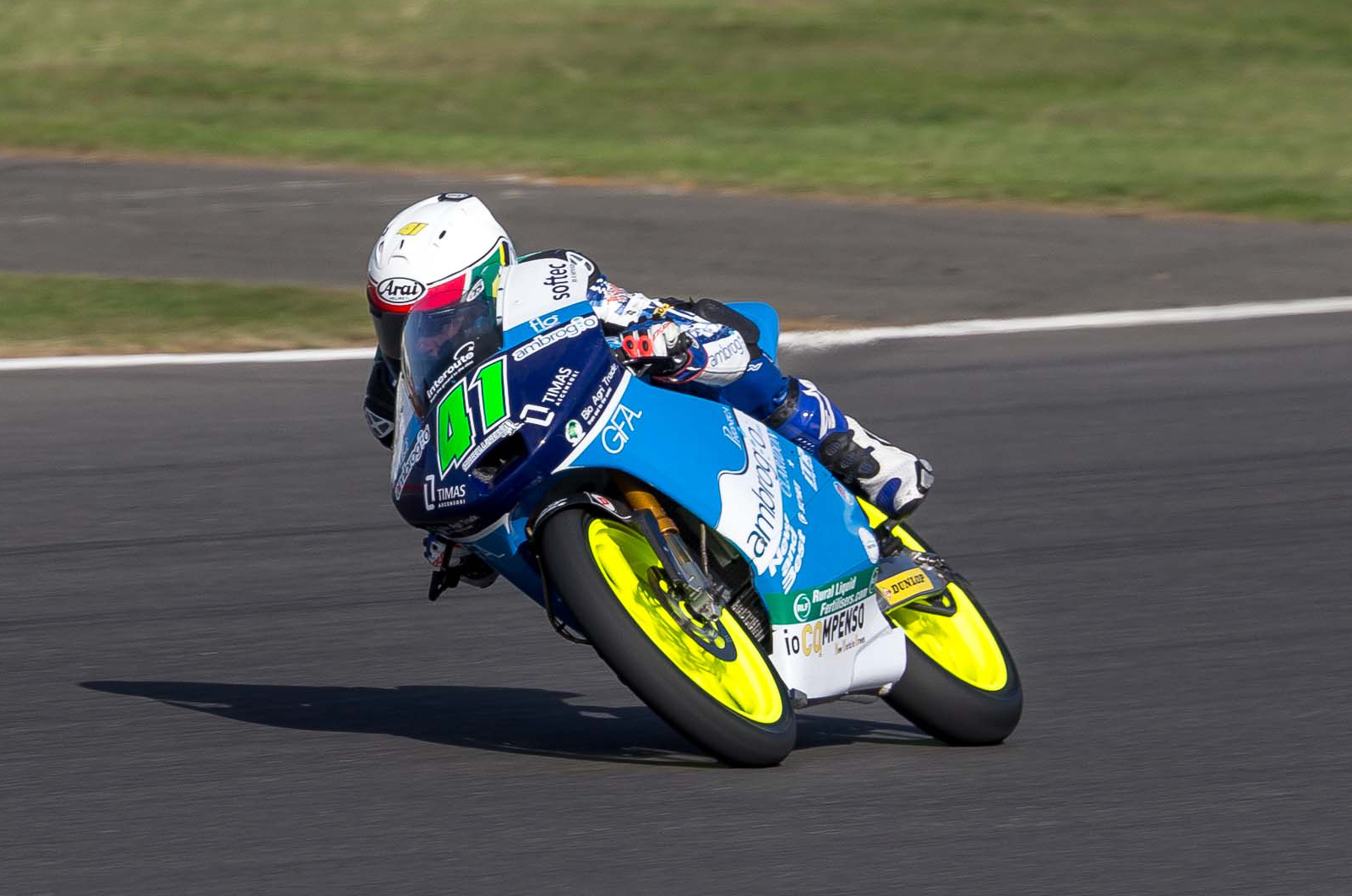 2013 Hertz British Grand Prix - Moto3 - #41 Brad Binder